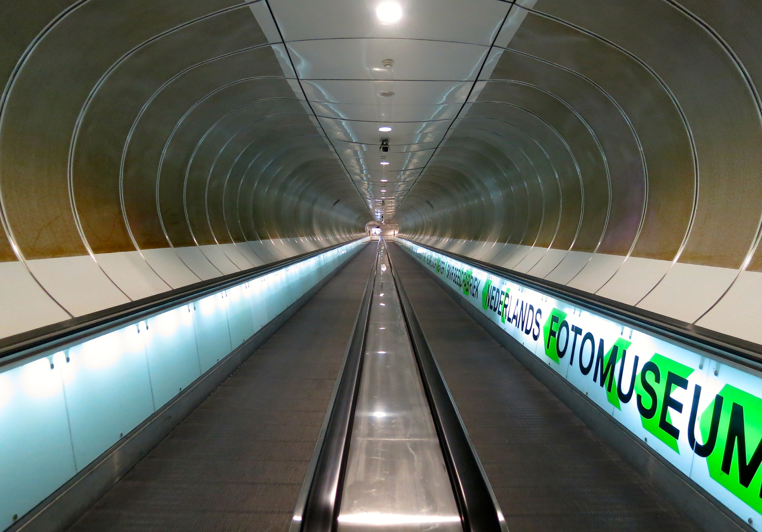 Metrostation Wilhelminaplein, Rotterdam. Tunnel naar het Nieuwe Luxortheater.